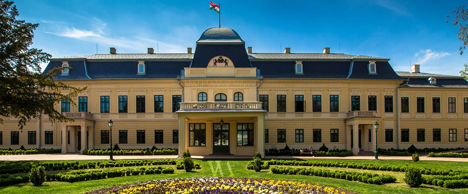 A 2016 márciusában átadott Harruckern-Wenckheim-Almásy-kastély képe a várkert felöl.